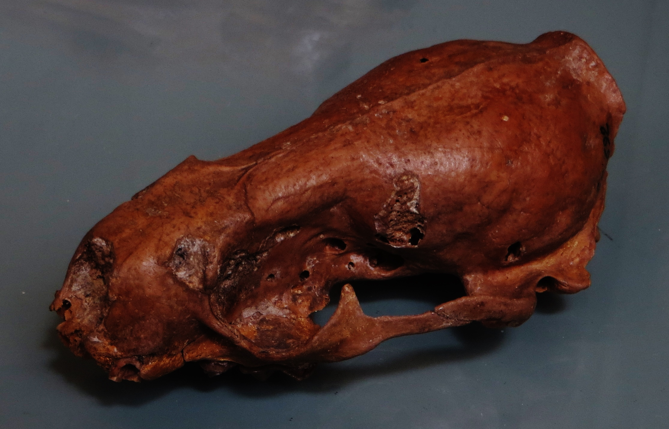 Fossil of Potamotherium, an extinct mammal - Took the photo at Musee d'Histoire Naturelle, Paris